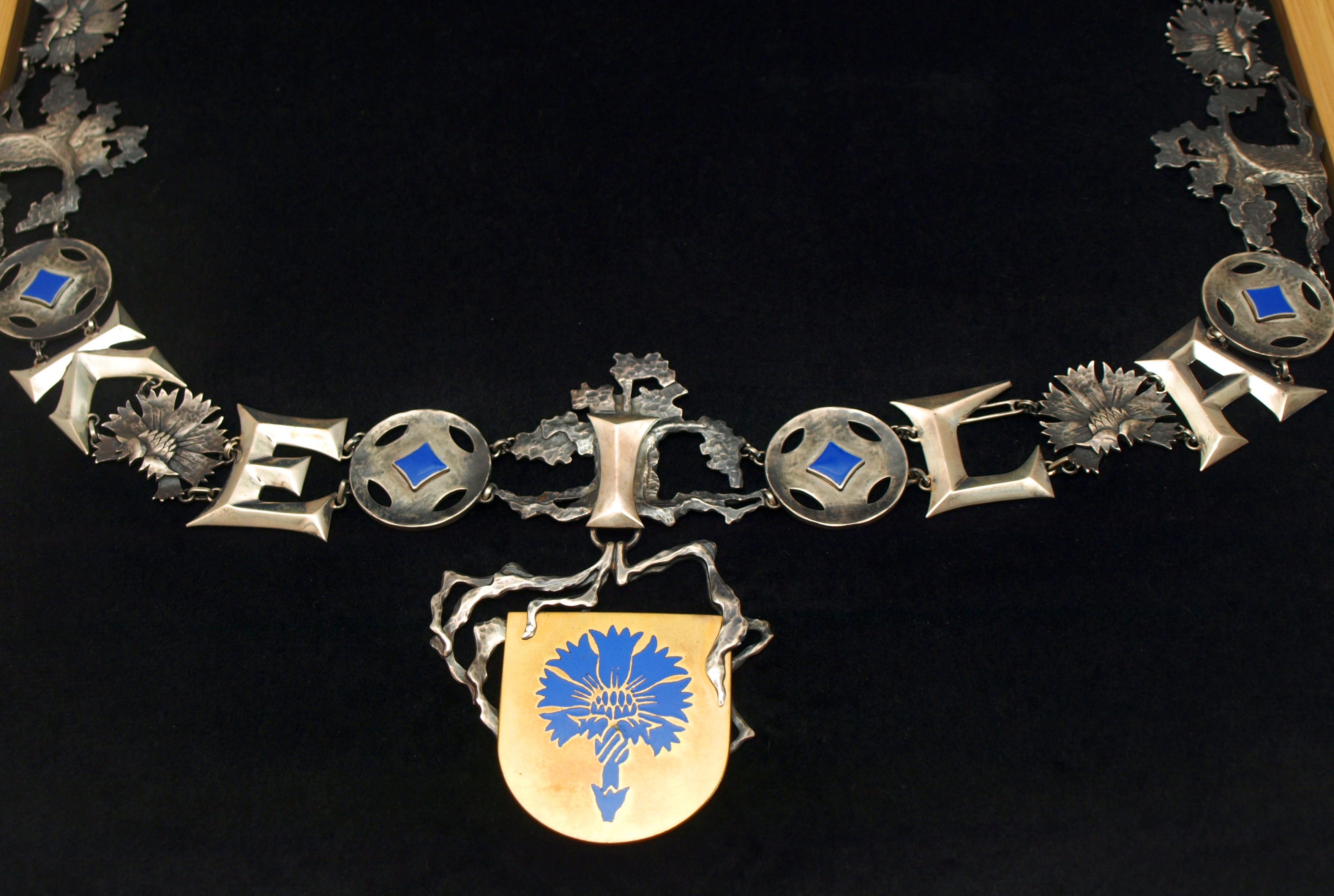 Keila linnapea ametikett